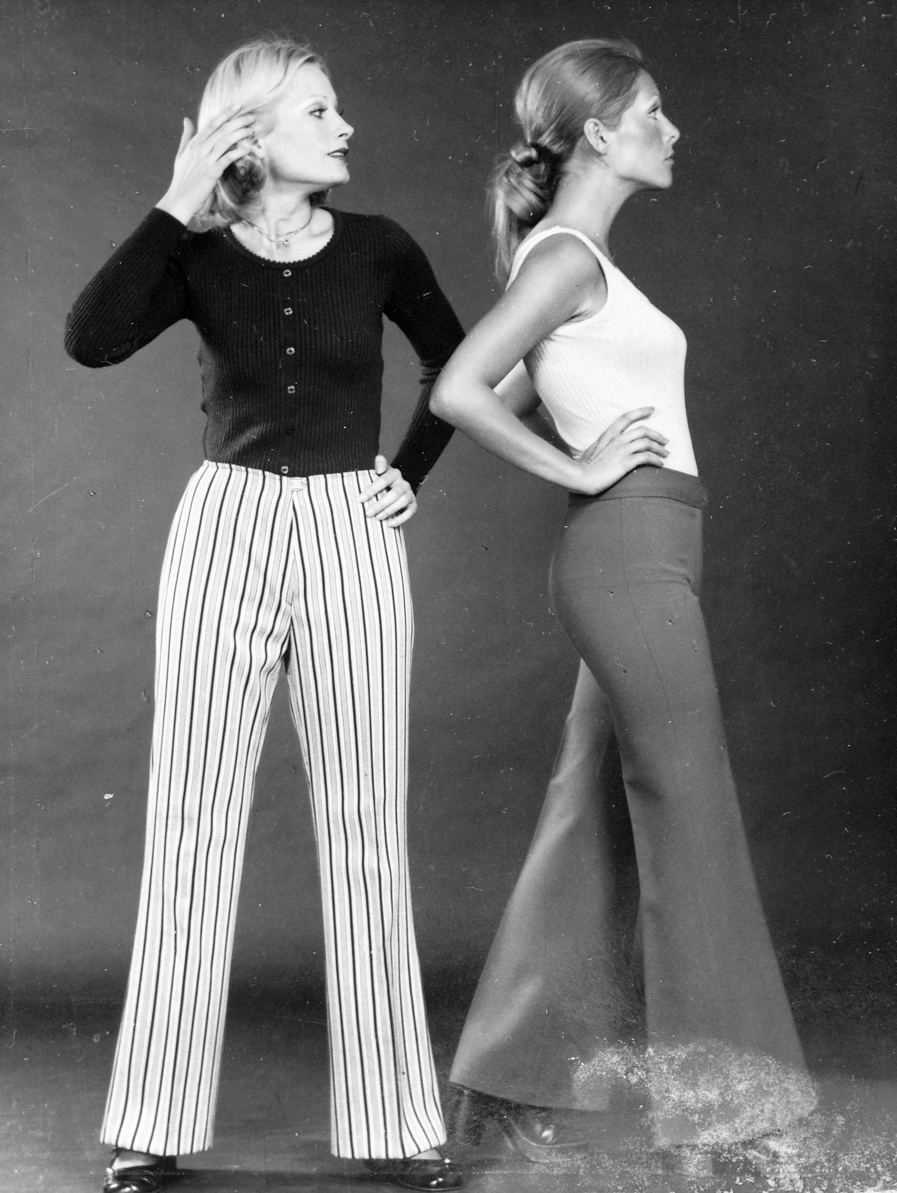 Bakos Ilona és Pataki Ági manökenek.